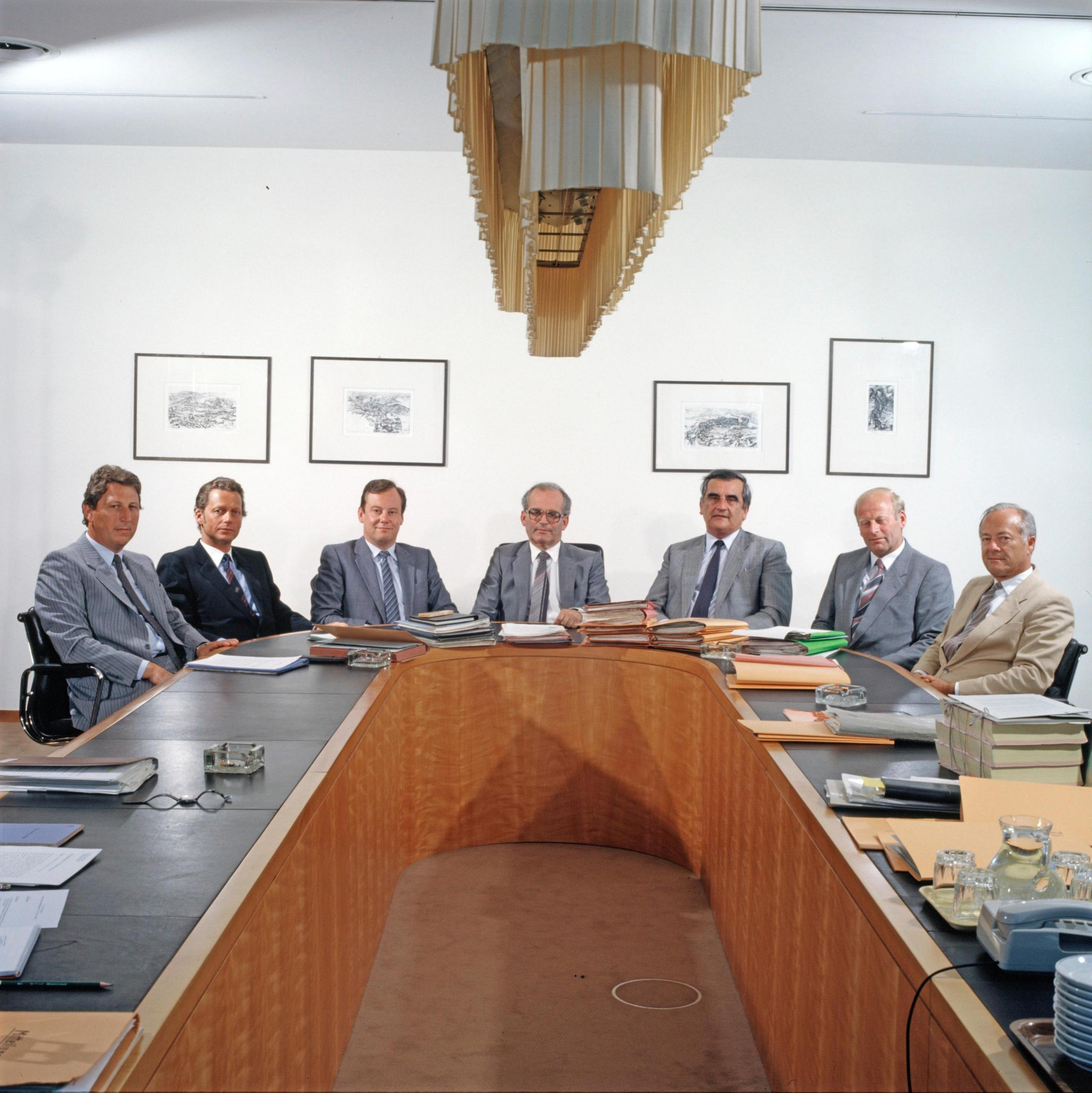 Regierungssitzung der Vorarlberger Landesregierung Keßler IV im Juni 1983. Regierungsmitglieder (v.l.n.r.): Fredy Mayer, Karl-Werner Rüsch, Siegfried Gasser, Herbert Keßler, Rudolf Mandl, Konrad Blank, Elmar Rümmele